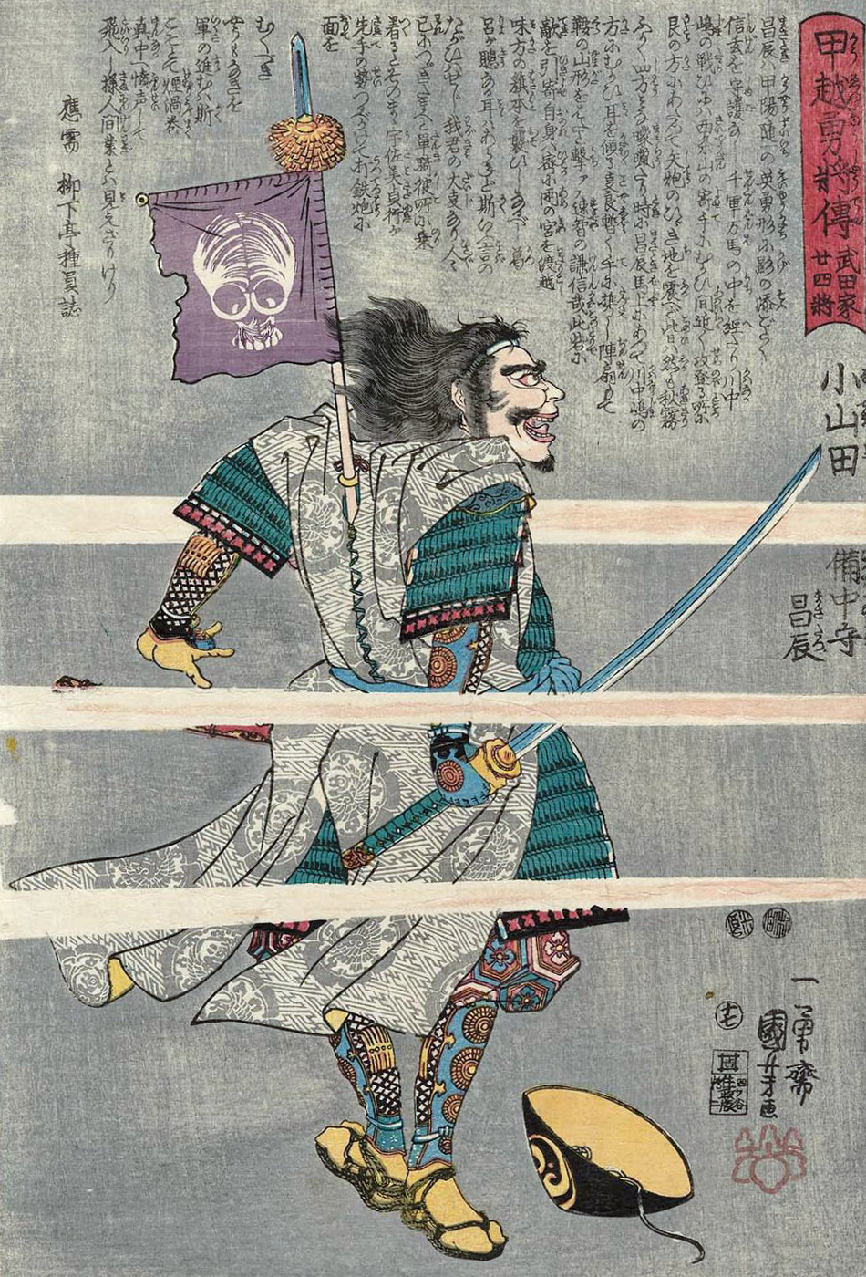 「甲越勇將傳武田家廾四將 ：小山田備中守昌辰」1848年作